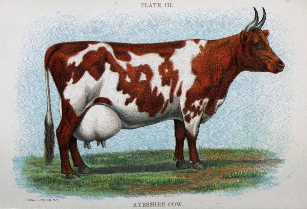 mammals-00074_-_AYESHIRE COW [3311x2259]@G._1_07_